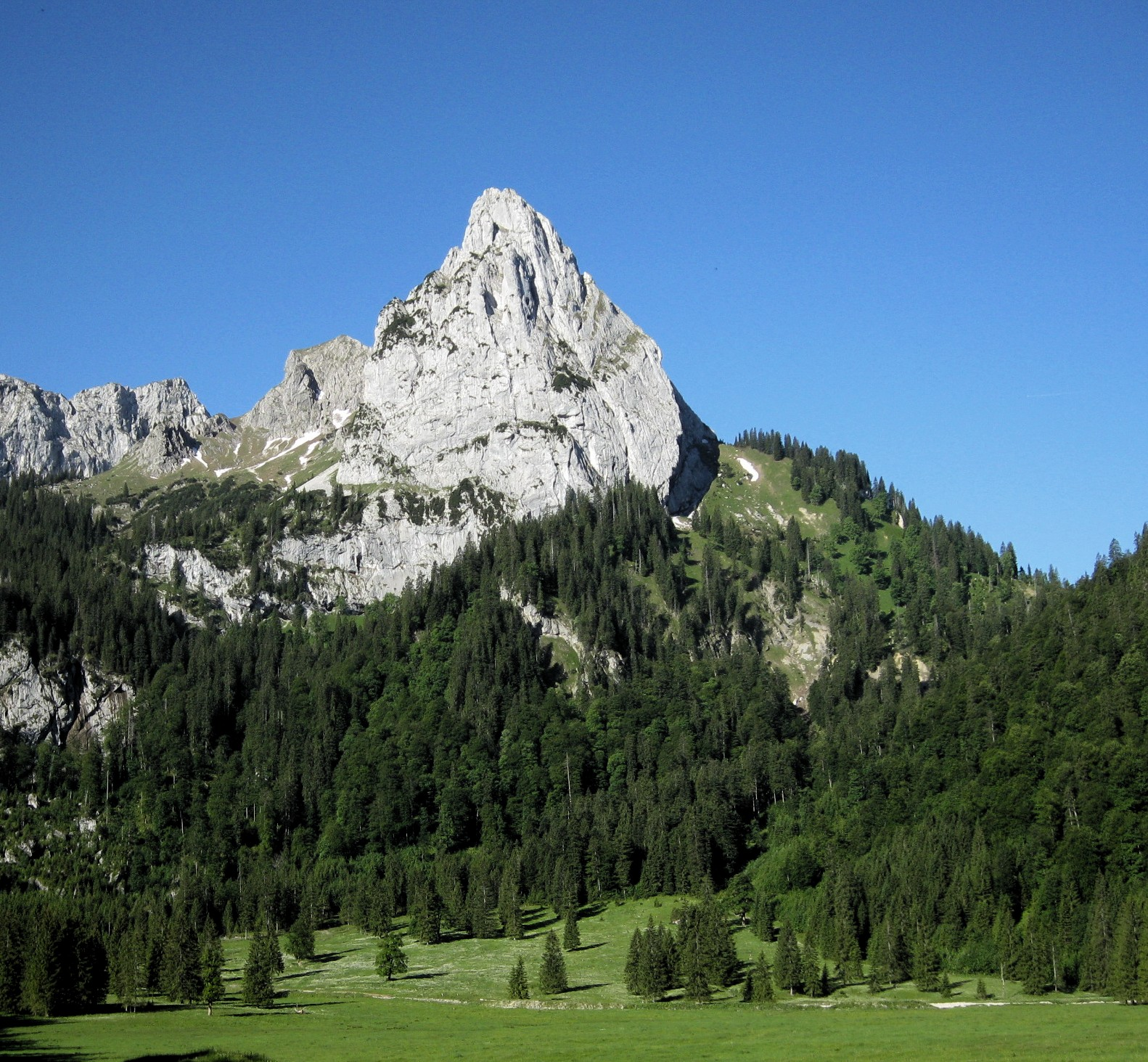 Nordost-Ansicht des Geiselstein